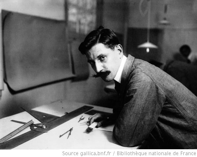 Ernest Henry, ingénieur de la maison Peugeot